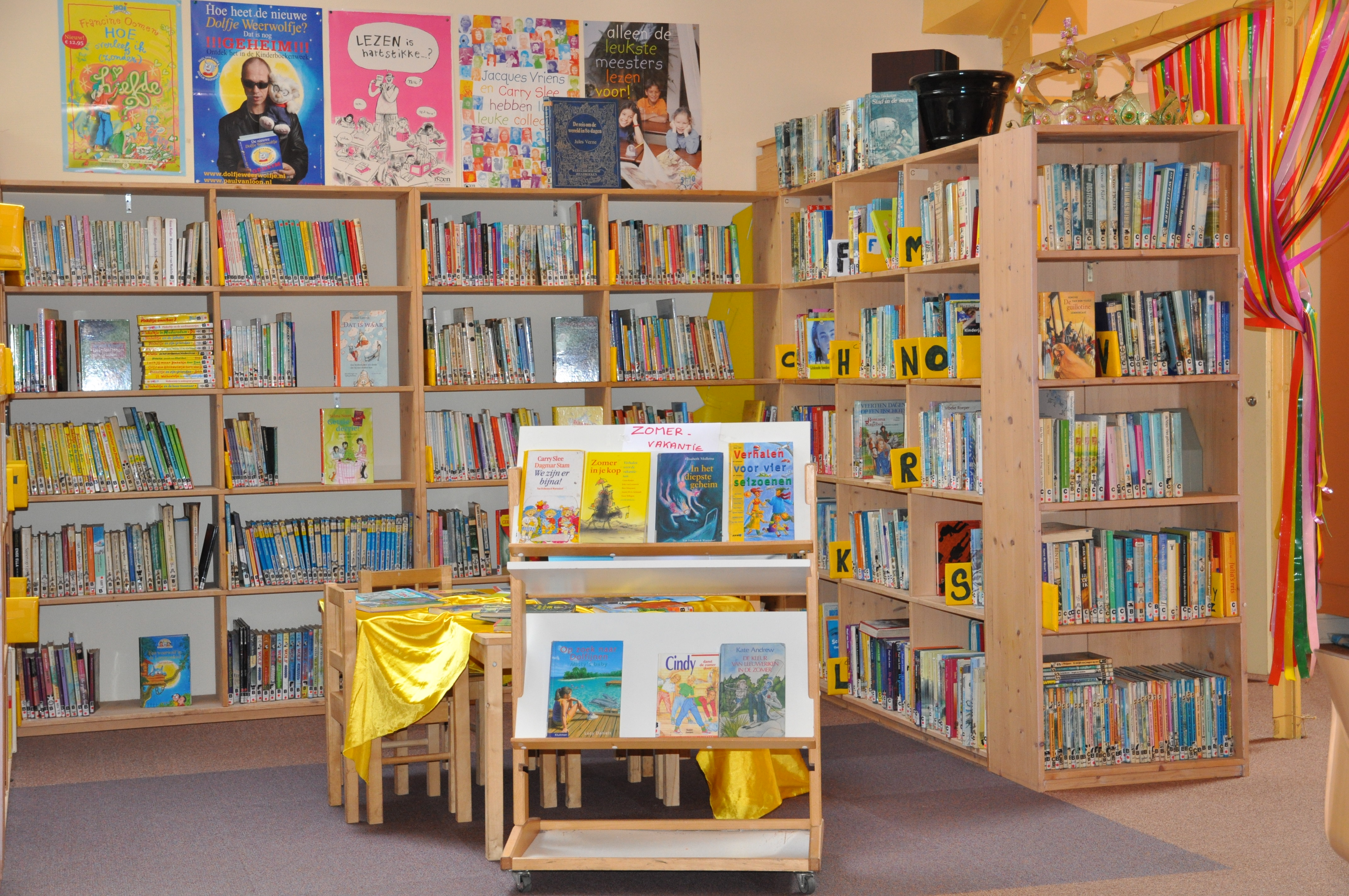 Bibliotheek op de Werkplaats Kindergemeenschap in Bilthoven.